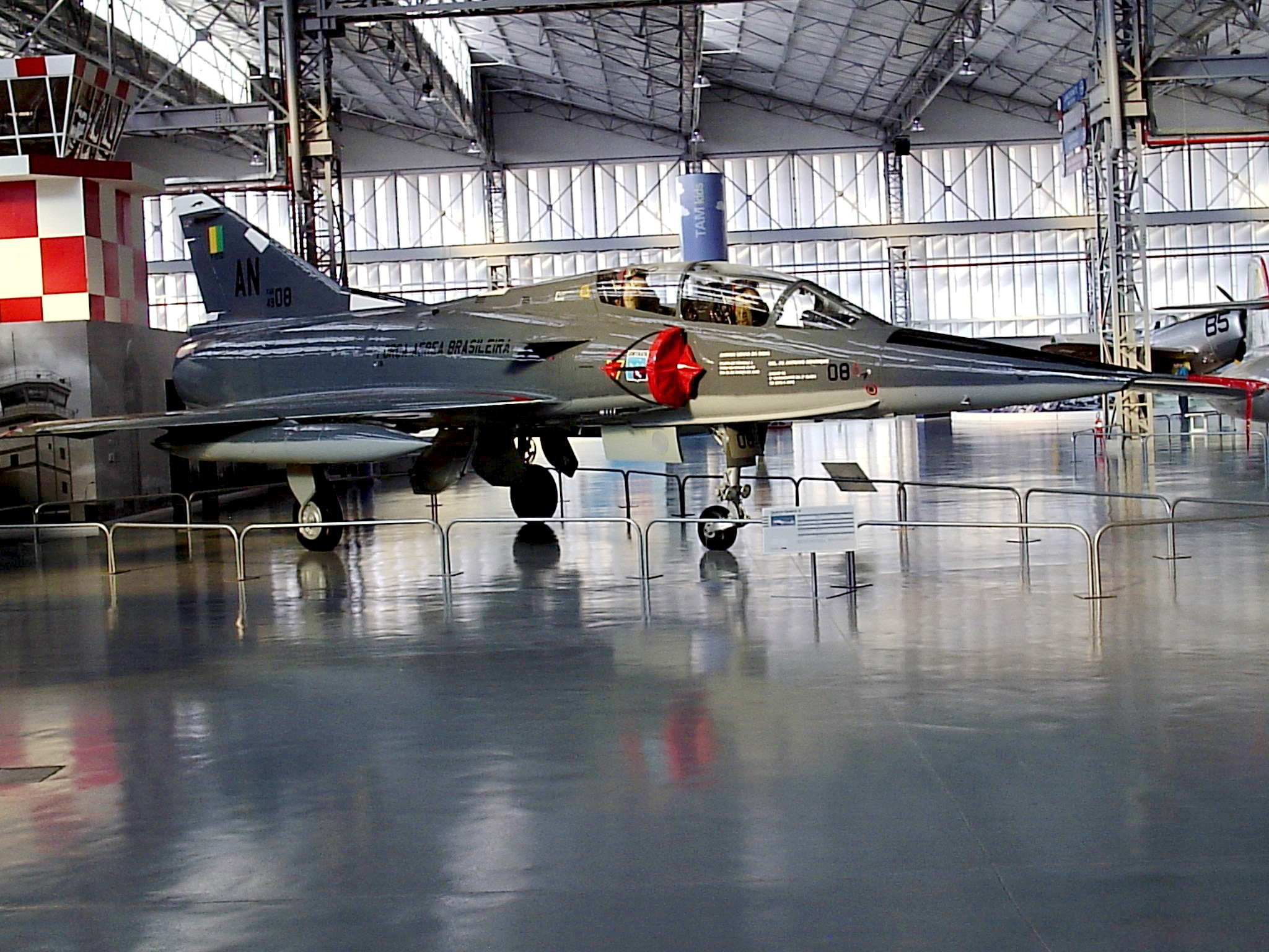 Mirage III D - Esse avião está pintado com o nome do nosso querido Ayrton Senna, que teve a oportunidade de voar nele como passageiro - Museu TAM